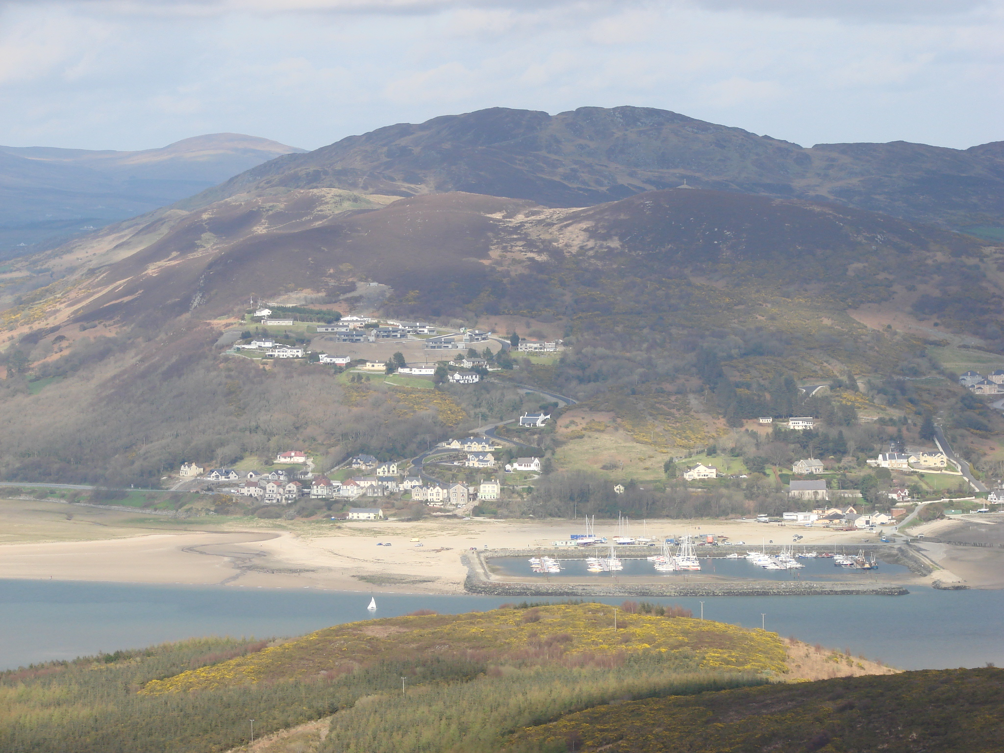 Fahan